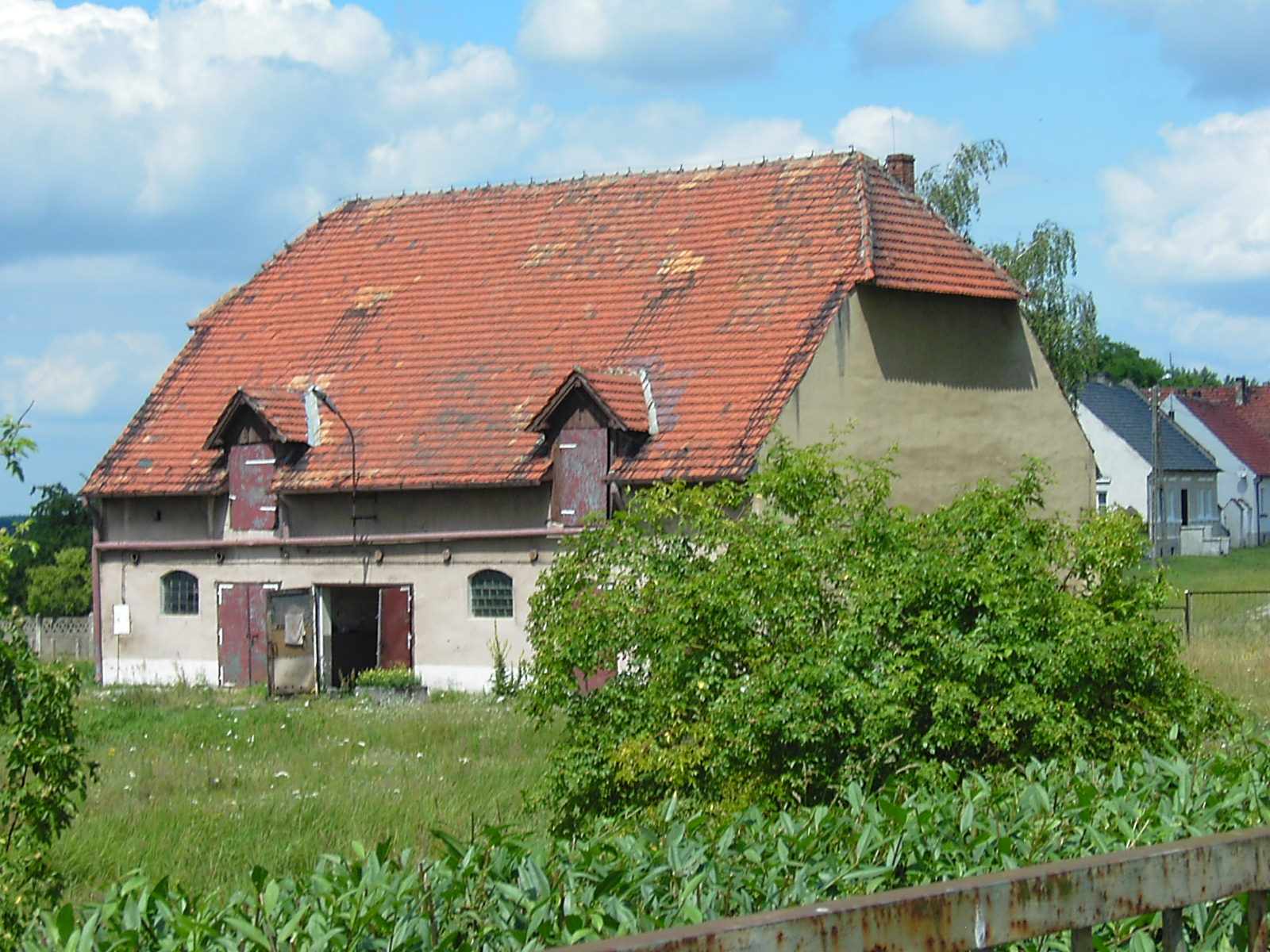 Była strażnica WOP w Żytowaniu